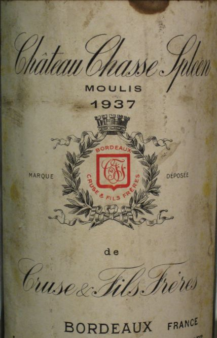 Château Chasse Spleen 1937 label